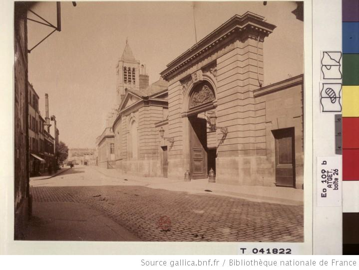 Saint-Denis : La Légion d'Honneur : Ancienne Abbaye. N ° Atget : 6165. 1901. Photographie positive sur papier albuminé d'après négatif sur verre au gélatinobromure ; 17,1 x 21,3 cm (épr.). [Cote : BNF - Est. Eo 109b bte 26 ; n ° micr. T041822]